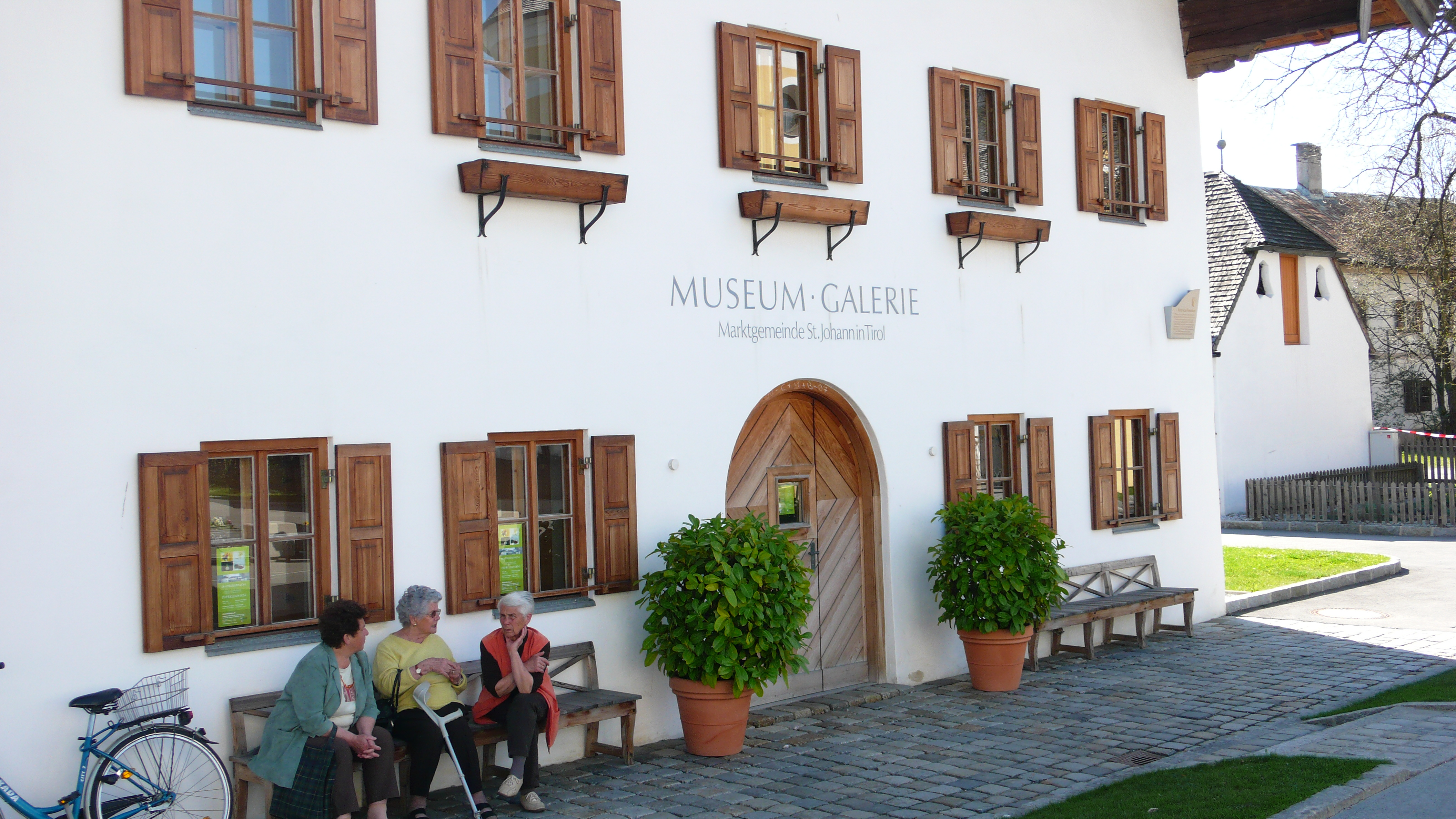 Museum